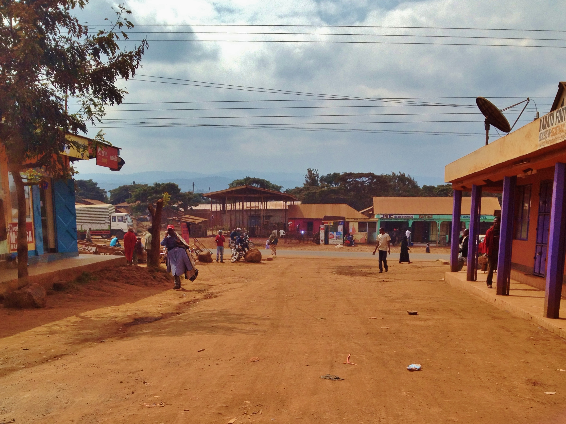 Karatu, Tanzania